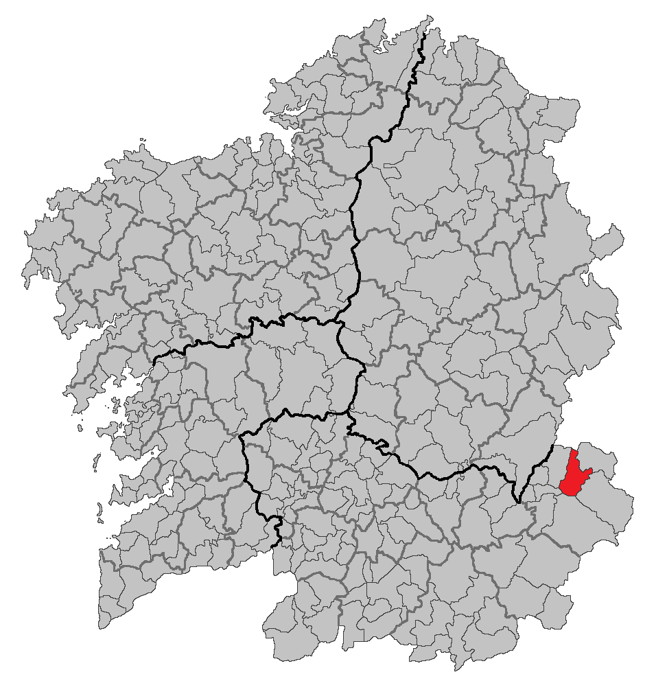 Mapa coa localización do concello de O Barco de Valdeorras.